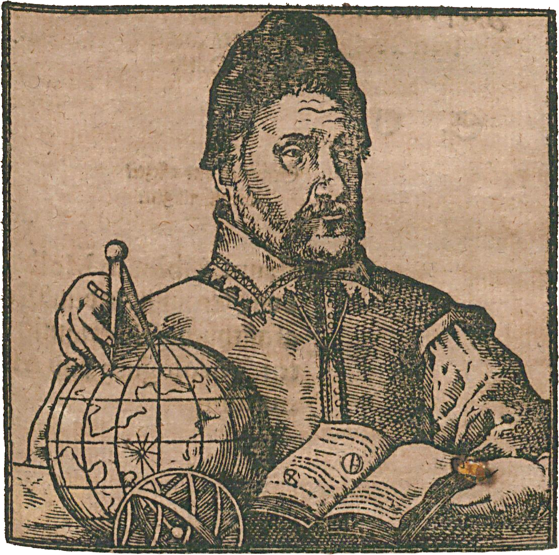 Hornjoserbsce: Portret Albina Mollera (1541–1618); serbski farar, astronom, protykar, přirodospytnik a pioněr spisowneje serbšćiny.